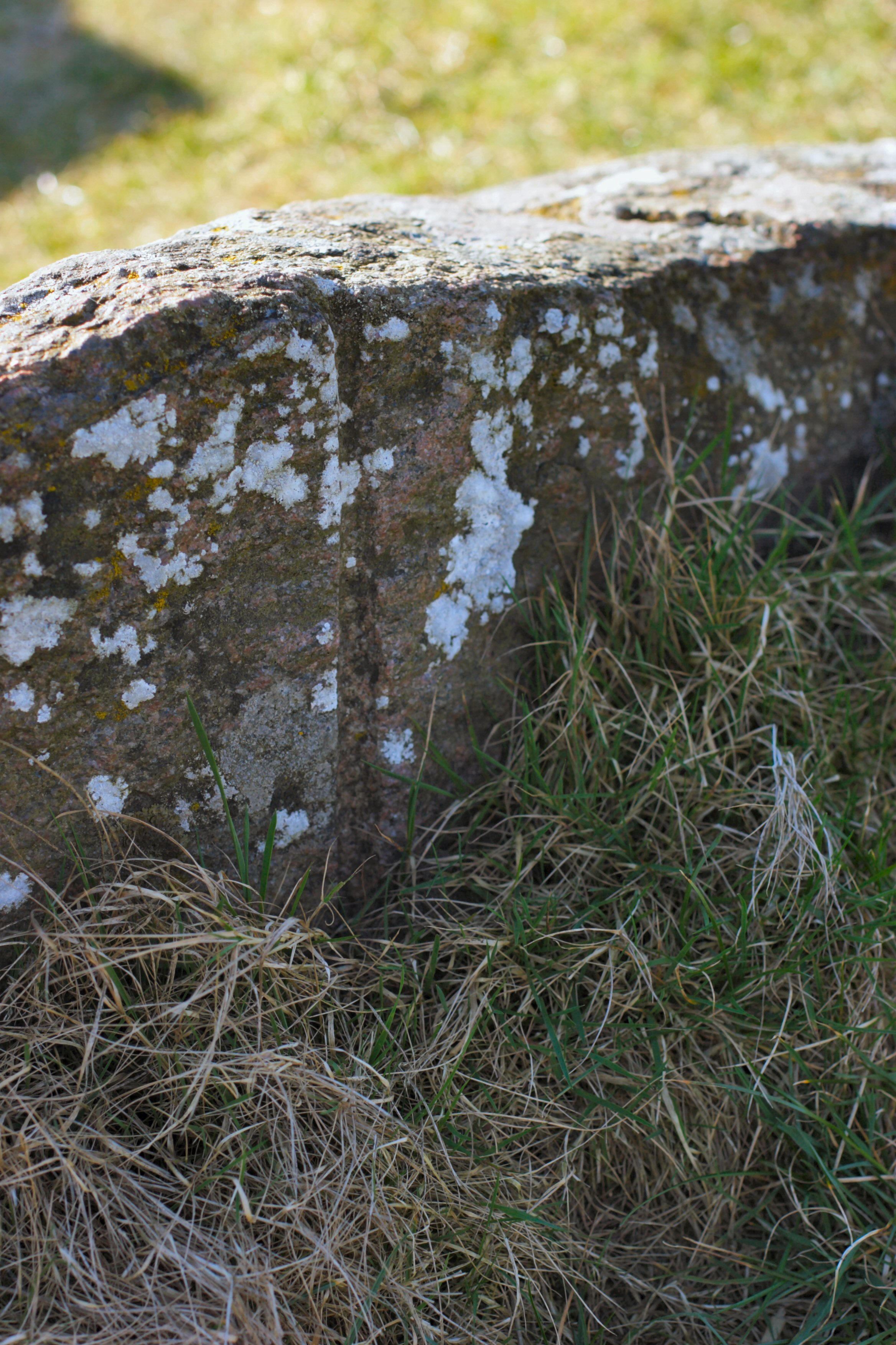 Borehul i sten der sikkert er forsøgt sprængt før fredningen